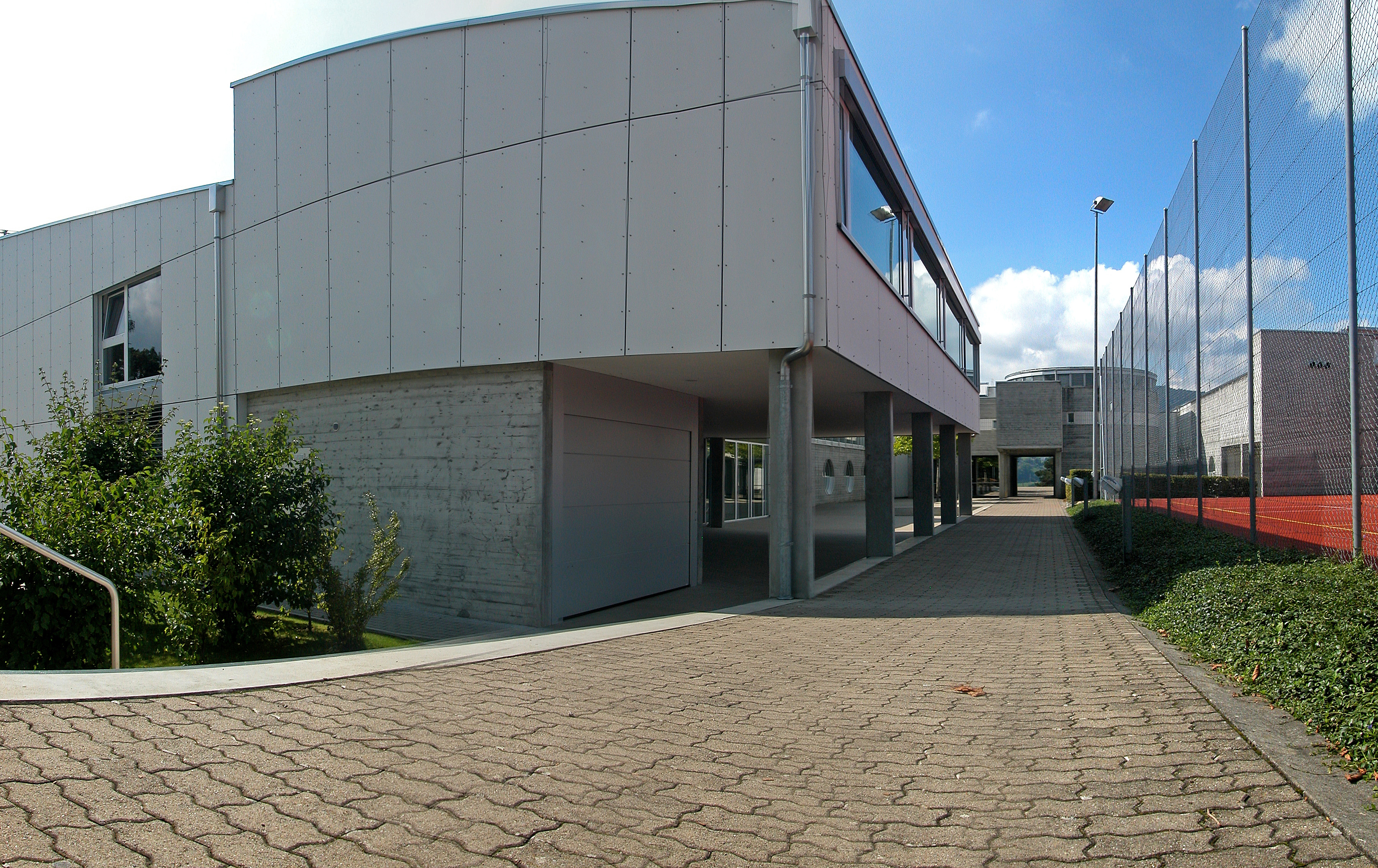 Das Schulhaus von Meisterschwanden Source: Alexander Umbricht